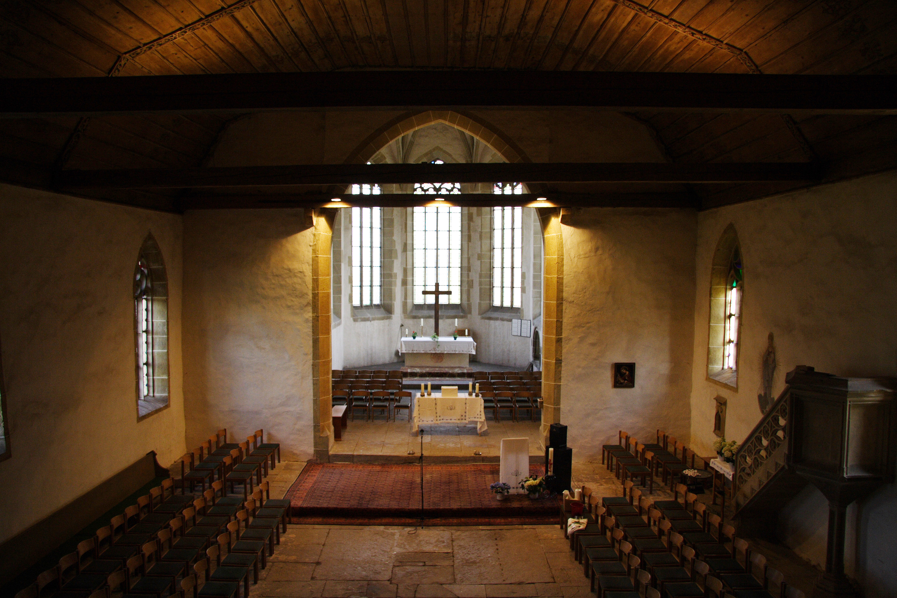 Liebfrauenkirche Lienzingen - Gesamtansicht des Innenraums